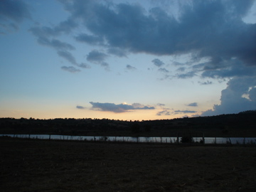 Vista nocturna de la lagunita